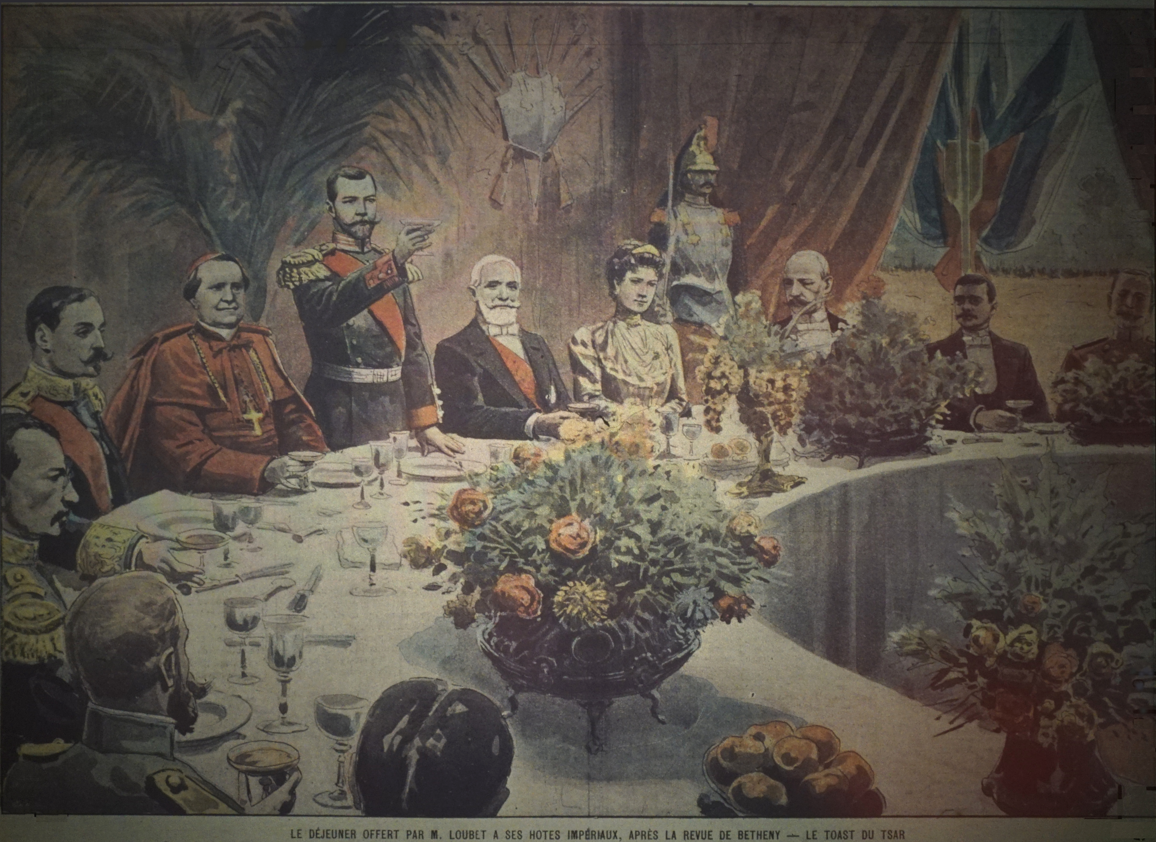 publié pour les grandes manoeuvres de l'est.